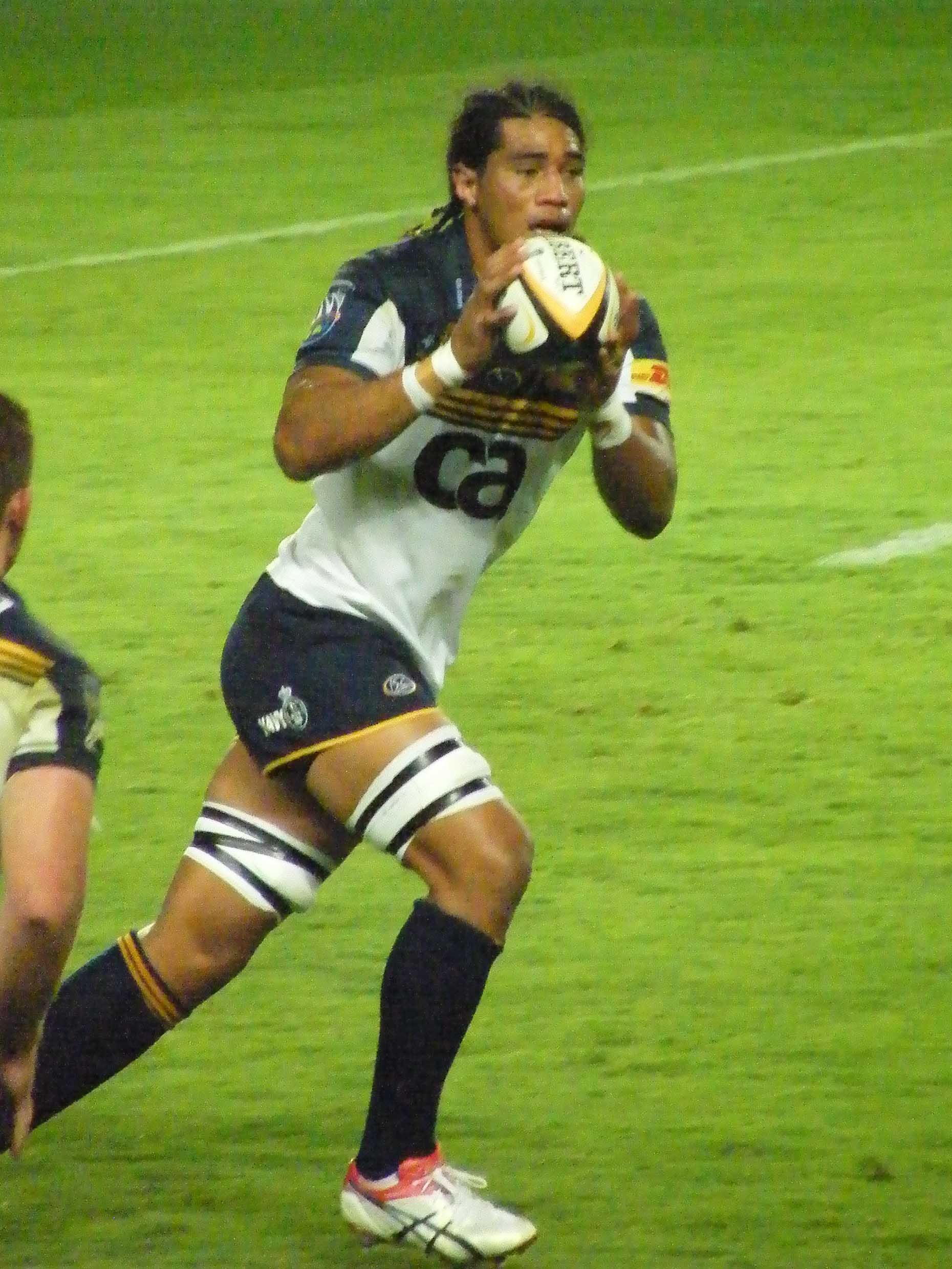 Brumbies forward Sitaleki Timani